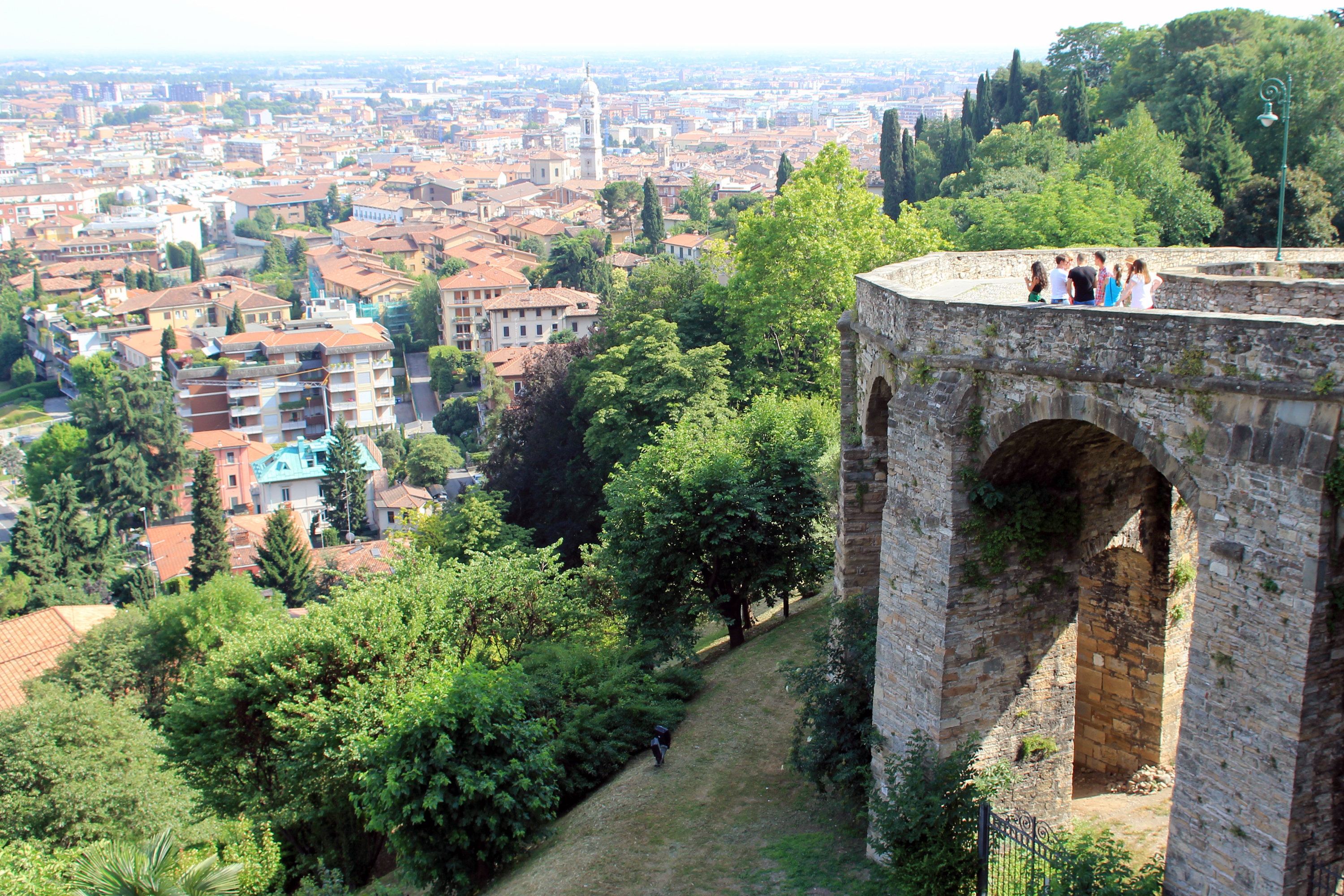 Bergamo